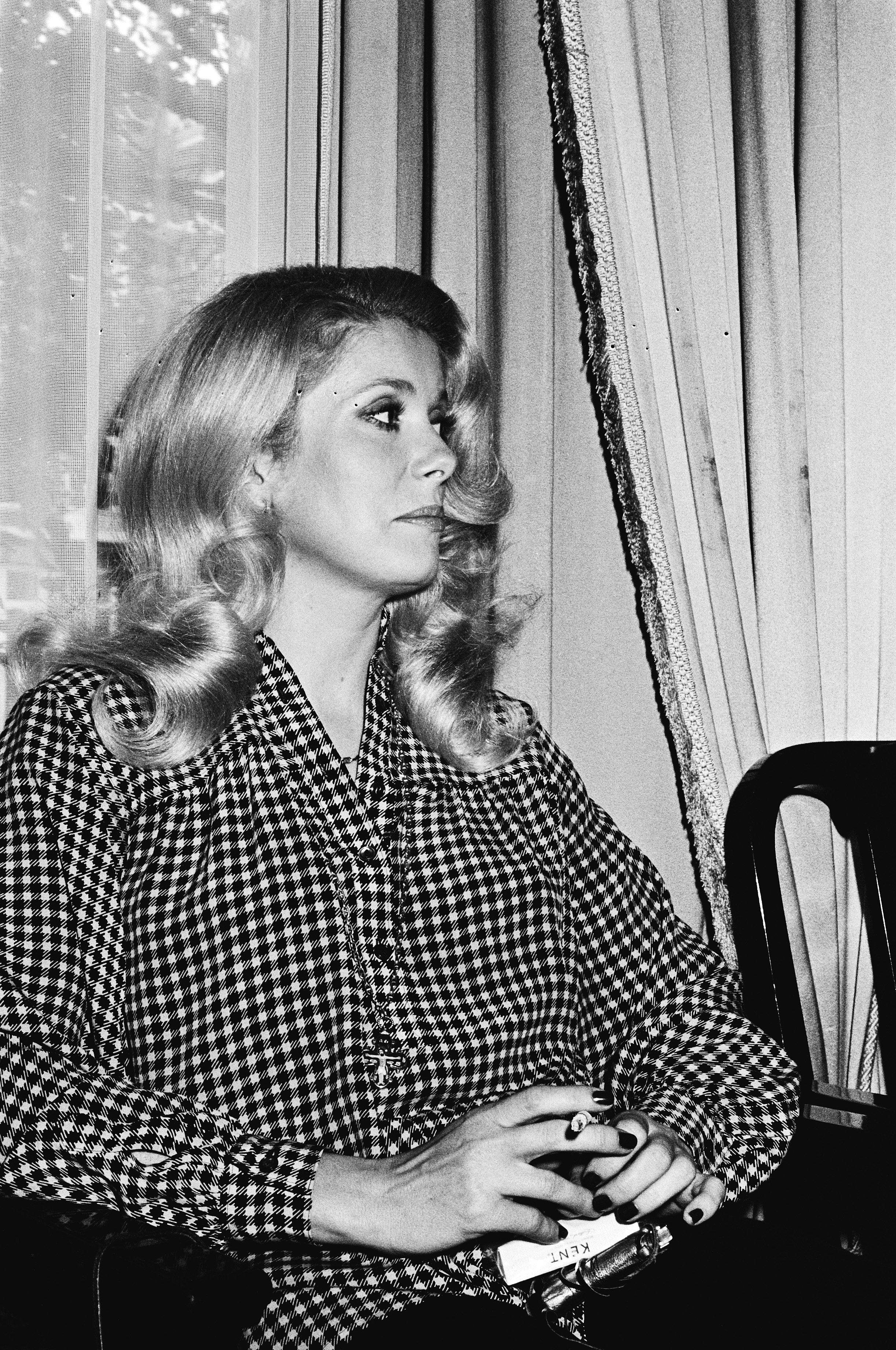 Collectie / Archief : Fotocollectie Anefo Reportage / Serie : Franse filmacteurs Beschrijving : Catherine Deneuve Datum : 16 mei 1979 Trefwoorden : actrices, portretten, speelfilms Persoonsnaam : Deneuve Catherine Fotograaf : Dijk, Hans van / Anefo Auteursrechthebbende : Nationaal Archief Materiaalsoort : Negatief (zwart/wit) Nummer archiefinventaris : bekijk toegang 2.24.01.05 Bestanddeelnummer : 930-2700